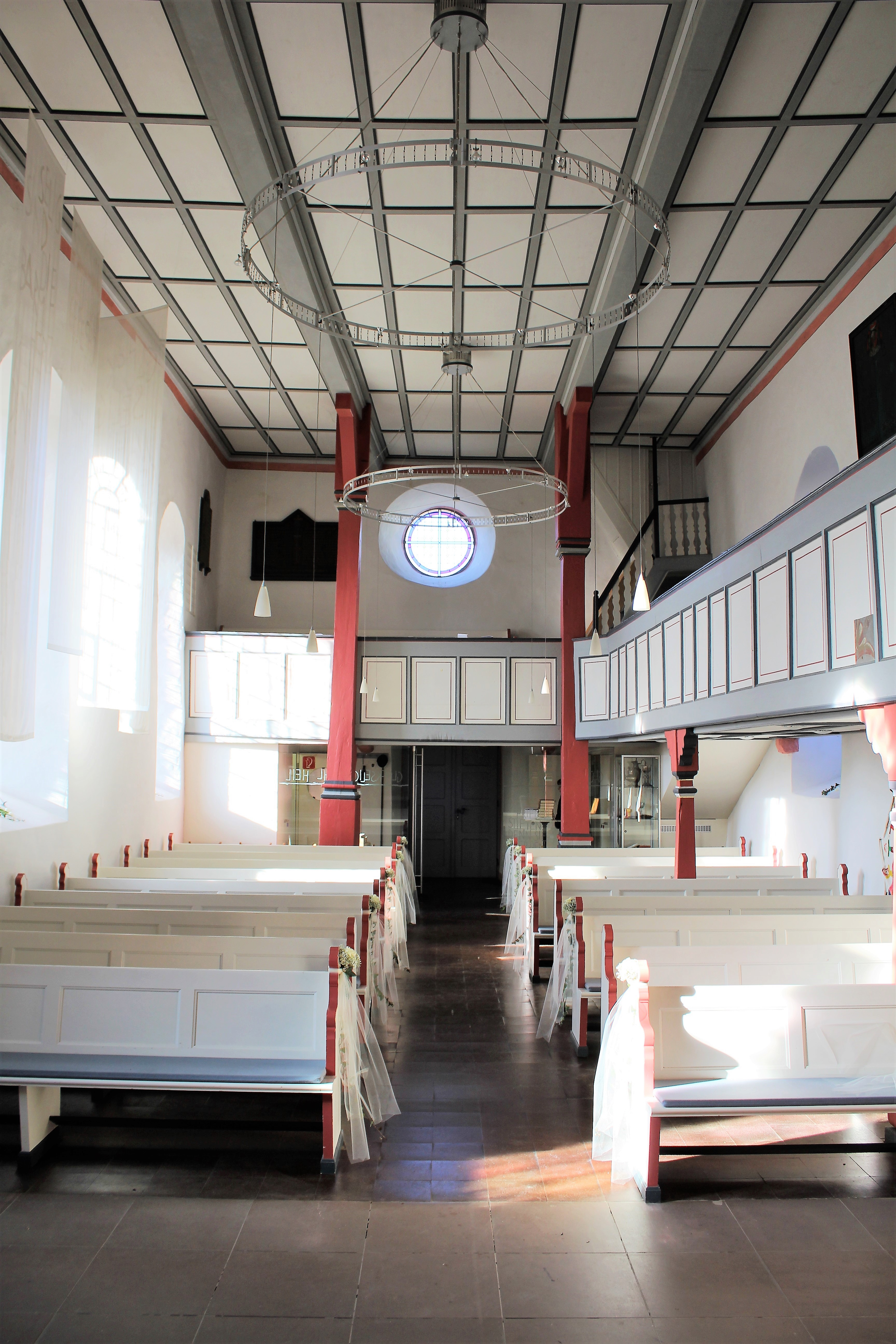 Evangelische Kirche Eichen (Nidderau), Main-Kinzig-Kreis, Hessen, Deutschland